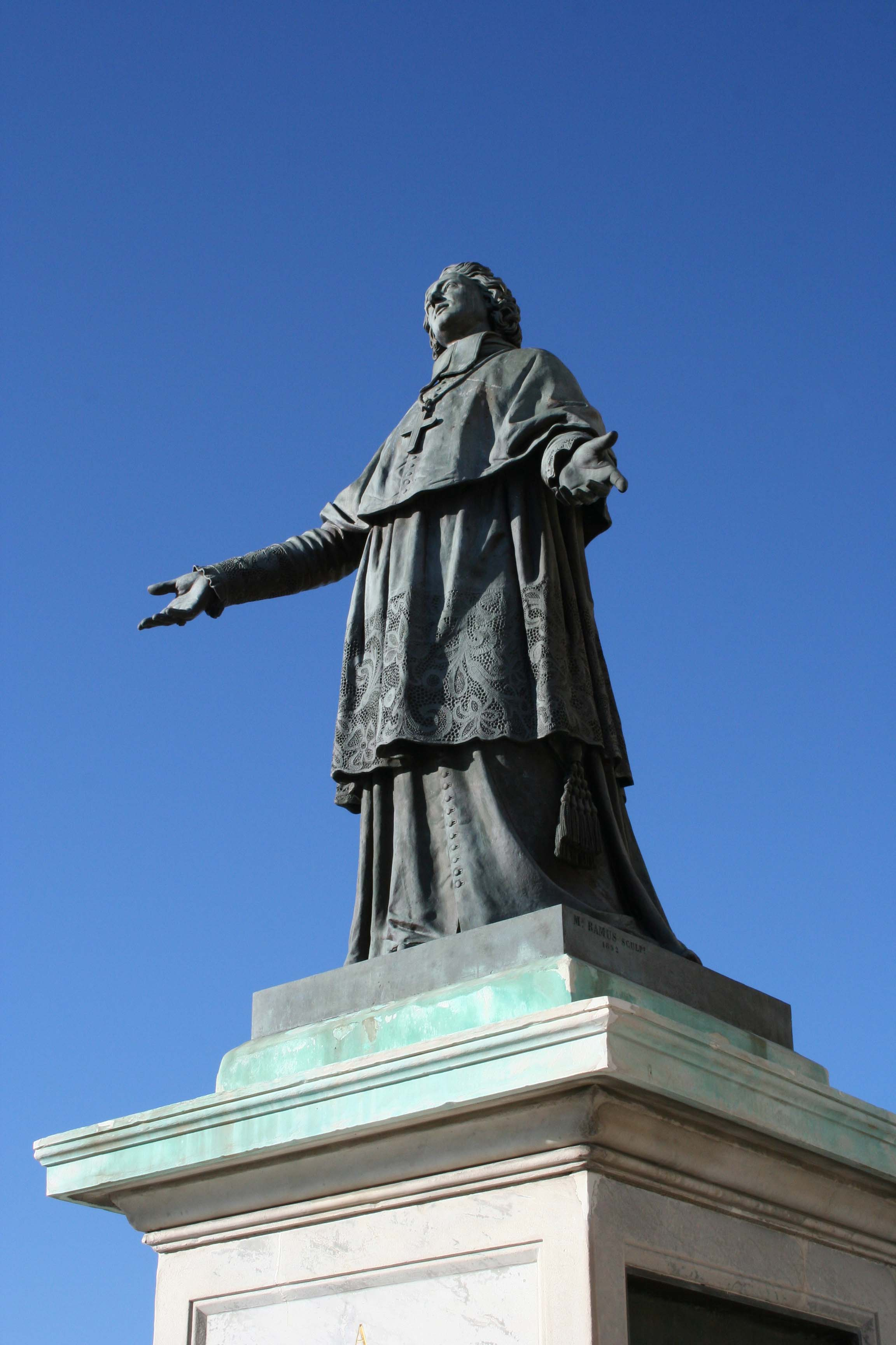 Statue en bronze de Mgr de Belsunce effectuée par Joseph Marius Ramus (1805-1888) se trouvant sur le parvis de la cathédrale de la Major à Marseille.